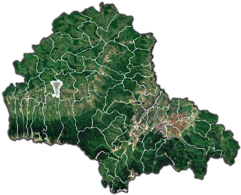 Fagaras jud Brasov.